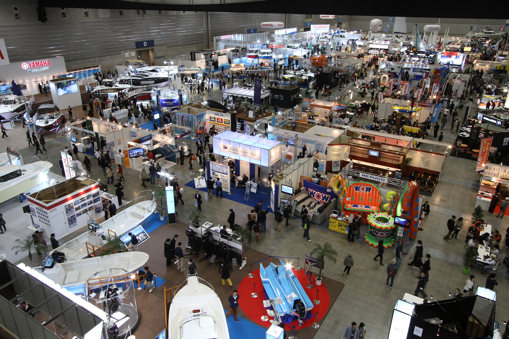 2013年ボートショー（第1会場）パシフィコ横浜